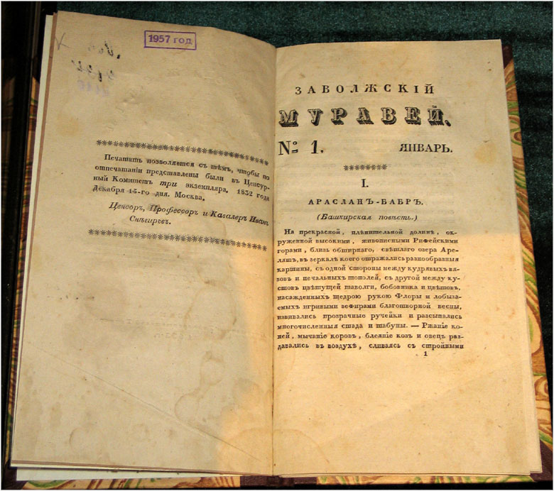 Заволжский Муравей. — Казань, 1833. — № 1. (фото первых страниц журнала, хранящегося в Российском государственном архиве древних актов. — Библиотека. — Маз. № 4110.)